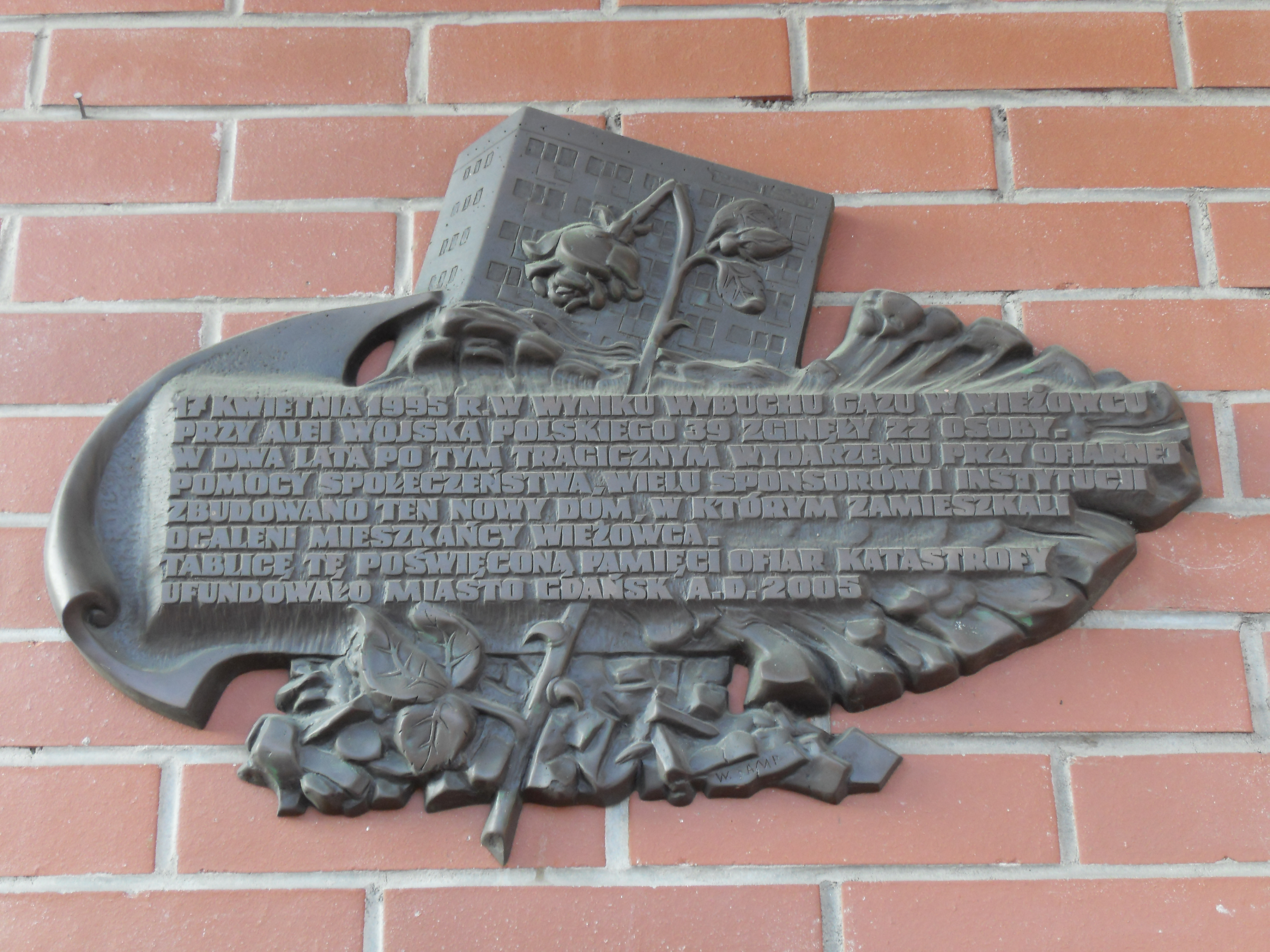 Tablica na ścianie domu przy Al. Wojska Polskiego 39 w Gdańsku, który stanął w miejscu wieżowca uszkodzonego po wybuchu gazu w 1995 r.